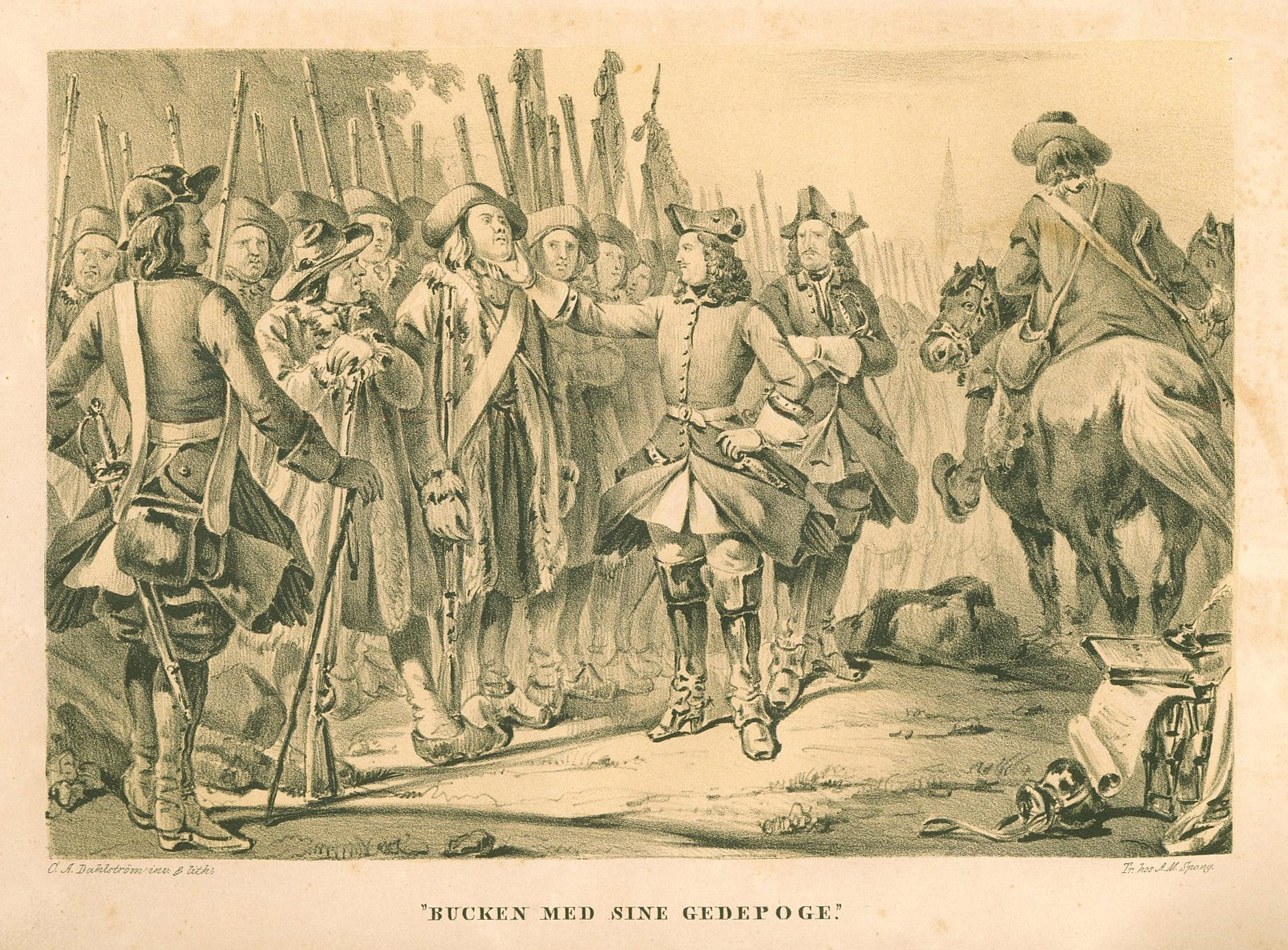 Bucken med sine Gedepoge. Från "Teckningar ur Sveriges historia" av Carl Andreas Dahlström.